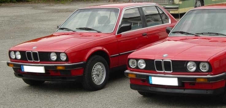 zwei rote BMW E30 Viertürer-Limousine, links bis 08/85, rechts bis 08/87